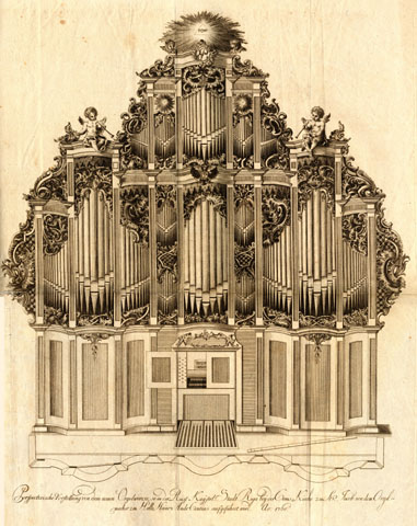 Scan from Johann Christoph Brotze's book Sammlung verschiedner Liefländischer Monumente. Perspectivische Vorstellung von dem neuen Orgelwercke, so in der Russ. Kayserl. Stadt Riga bey der Crons Kirche zu St. Jacob von dem Orgelmacher zu Halle Heinr. Andr. Contius aufgeführet wird. Anno 1760. [Johann Friedrich Bause; die Gravüre].